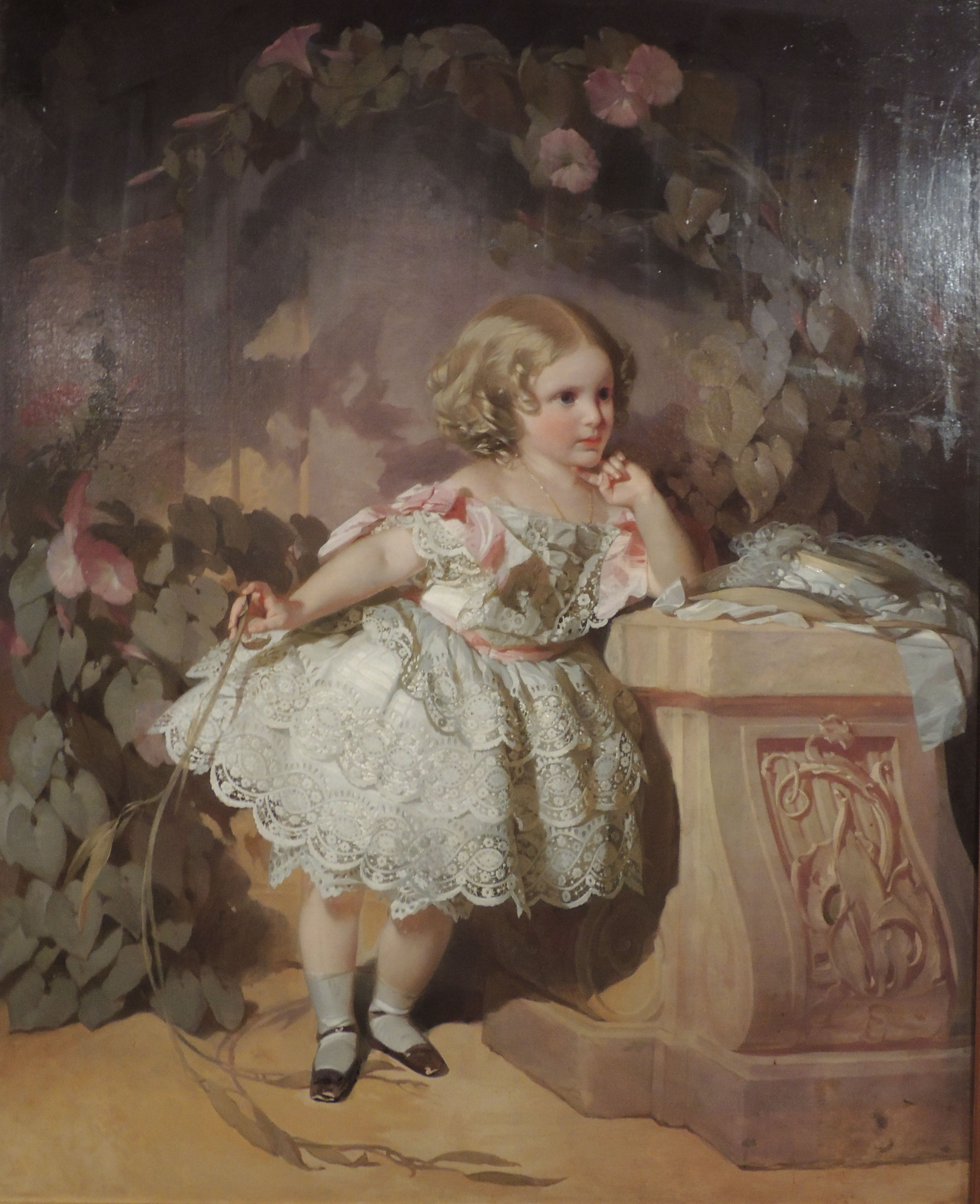 Иван Макаров. Портрет неизвестной девочки (графини О.А. Строгановой?). Начало 1860-х. Холст, масло. ГИМ Иконографическое предположение Т.Г. Дмитриевой, ГМП. Портрет поступил в музей из собрания наследников генерала Алексея Григорьевича Щербатова (1776-1848). Анализ данных смешанно-восходящей родословной последнего владельца имения Щербатовых Васильевское Одинцовского района, князя Александра Григорьевича Щербатова (1850-1915), позволяет предположить, что на портрете изображена его будущая жена Ольга Александровна Строганова (1857-1944), младшая дочь А.С. Строганова от брака с Т. Д. Васильчиковой. После 1918 покинула Россию, умерла в эмиграции во Франции. В собрании ГРМ находится портрет работы Макарова, поступивший из дворца Строгановых, традиционно называющийся "Девочка с собакой", хотя изображает мальчика. Можно утверждать, что это Сергей Александрович Строганов (1852-1923), брат Ольги. Вероятно, портреты были парными, они совпадают по размерам.